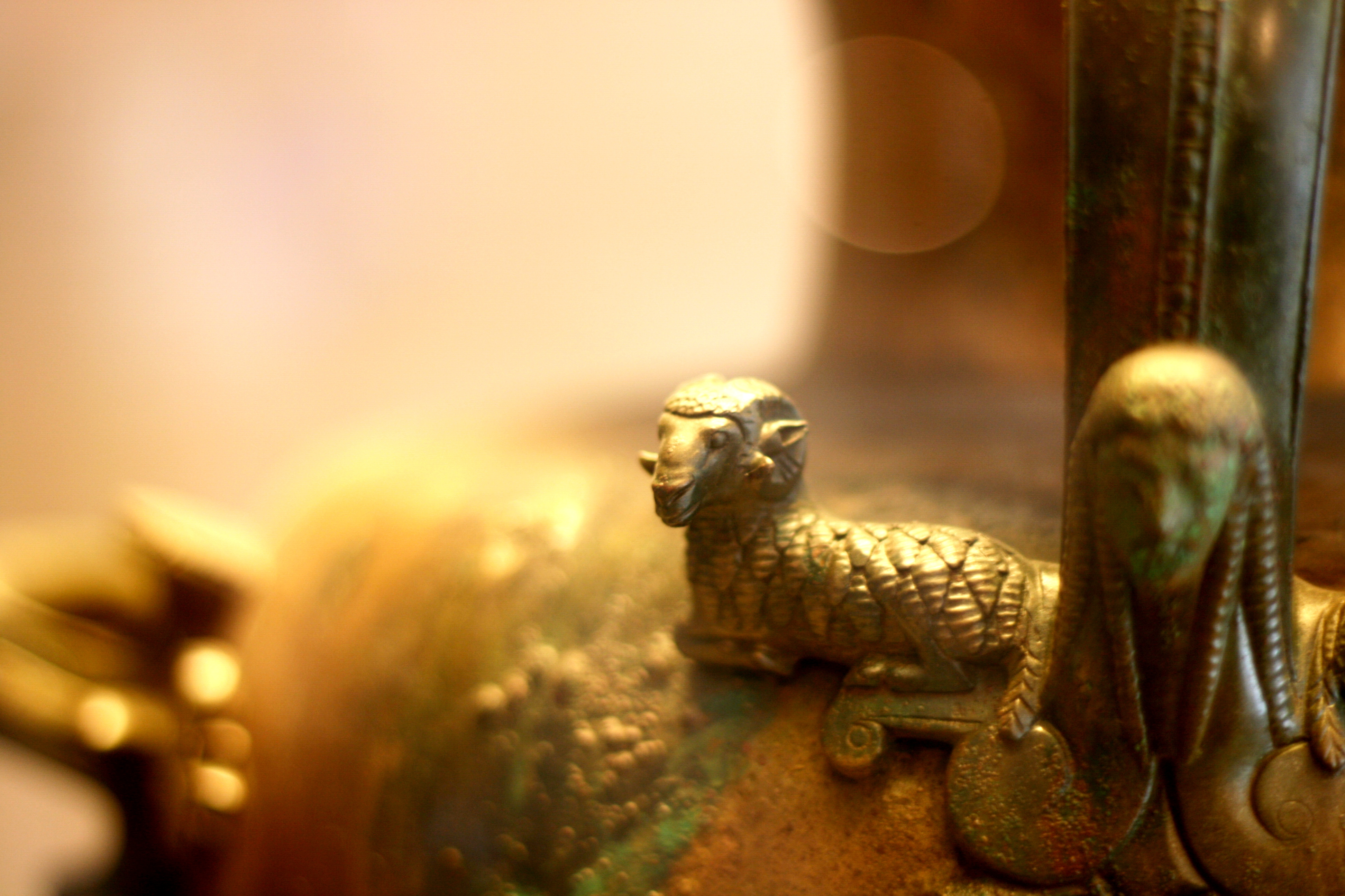 Museo Archeologico Nazionale di Paestum - MIBAC This is a photo of a monument which is part of cultural heritage of Italy.